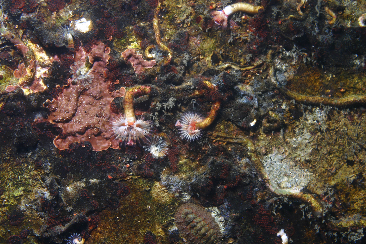 Serpulid worm (Serpula vermicularis)